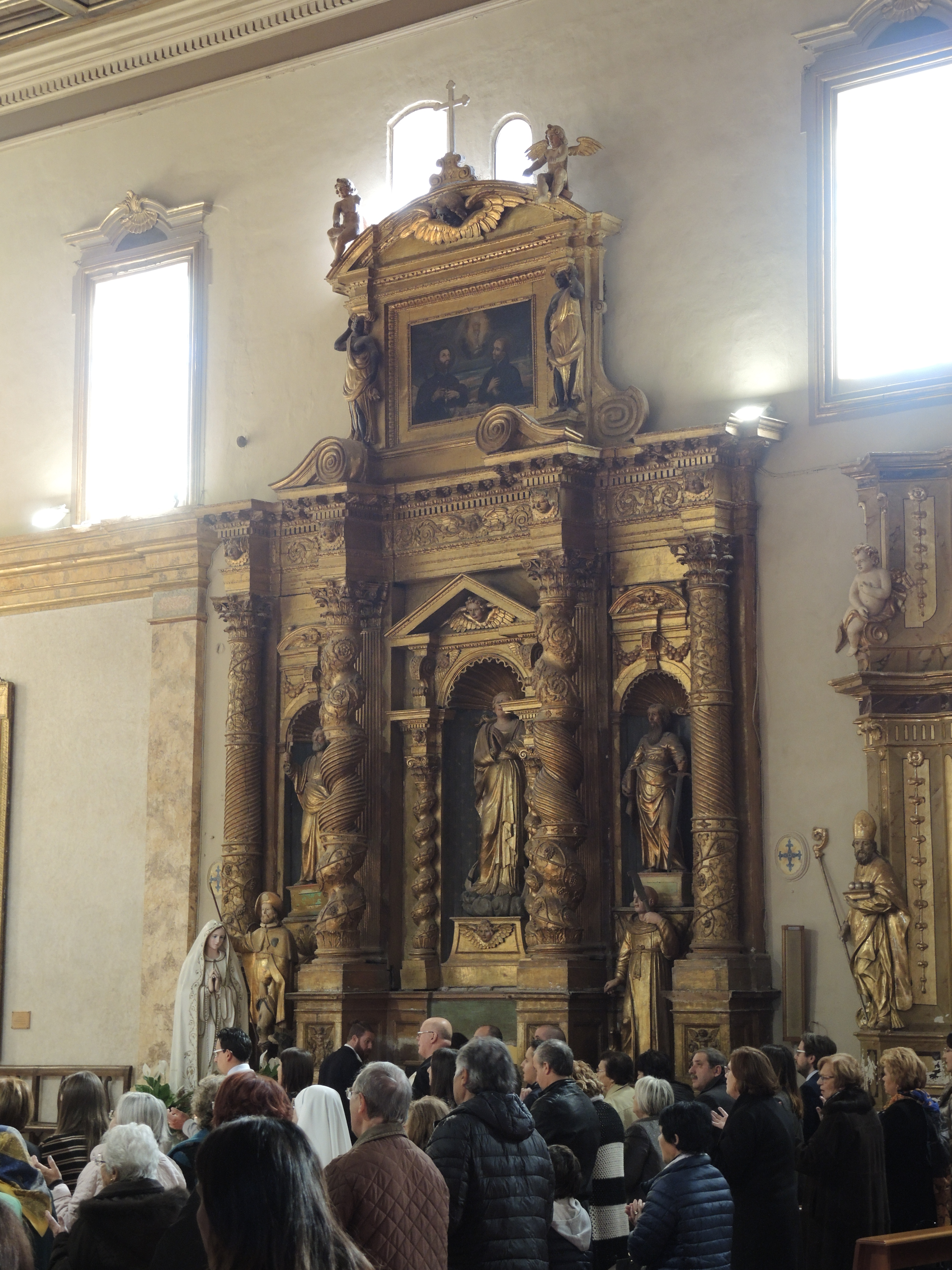 Città Sant'Angelo: Collegiata di San Michele Arcangelo